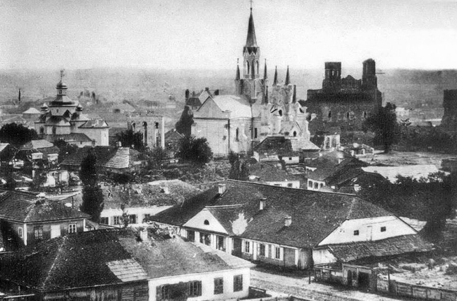 Вигляд міста Острога. Зліва: Упенська церква, Фарний костел, руїни Богоявленської церкви.